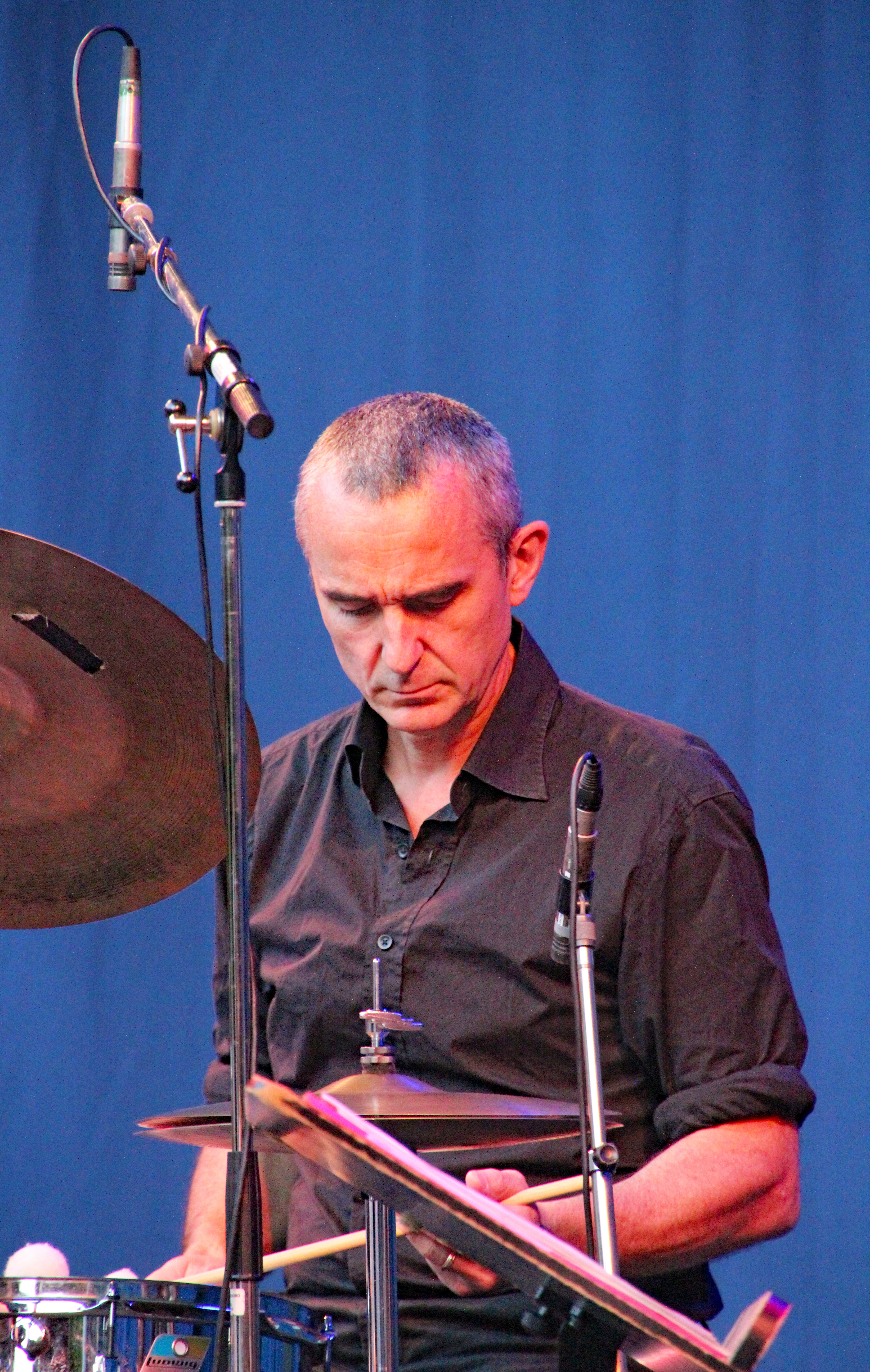 Bildinhalt: Christophe Marguet bei Jazz im Palmengarten Aufnahmeort: Frankfurt am Main, Deutschland Die dargestellte Person wurde bei einem öffentlichen Auftritt fotografiert.